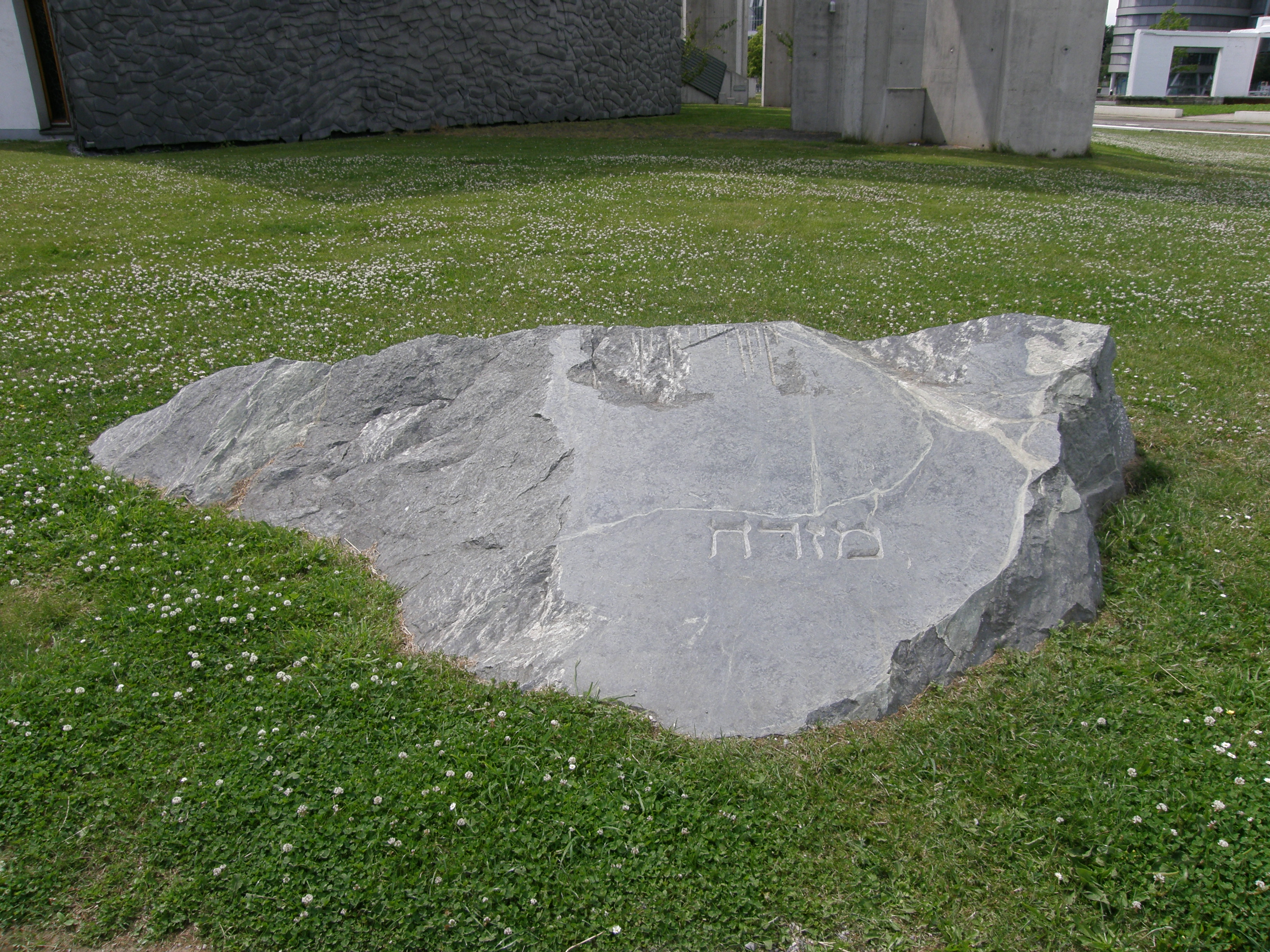 Halbierter und mit Inschrift versehener Stein an der Synagoge im Garten der Erinnerung im Innenhafen von Duisburg.